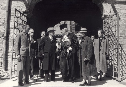 In primo piano, da sinistra: Luigi Einaudi, presidente della Repubblica Italiana, Plinio Fraccaro, rettore dell'Università di Pavia, ed Enrica Malcovati